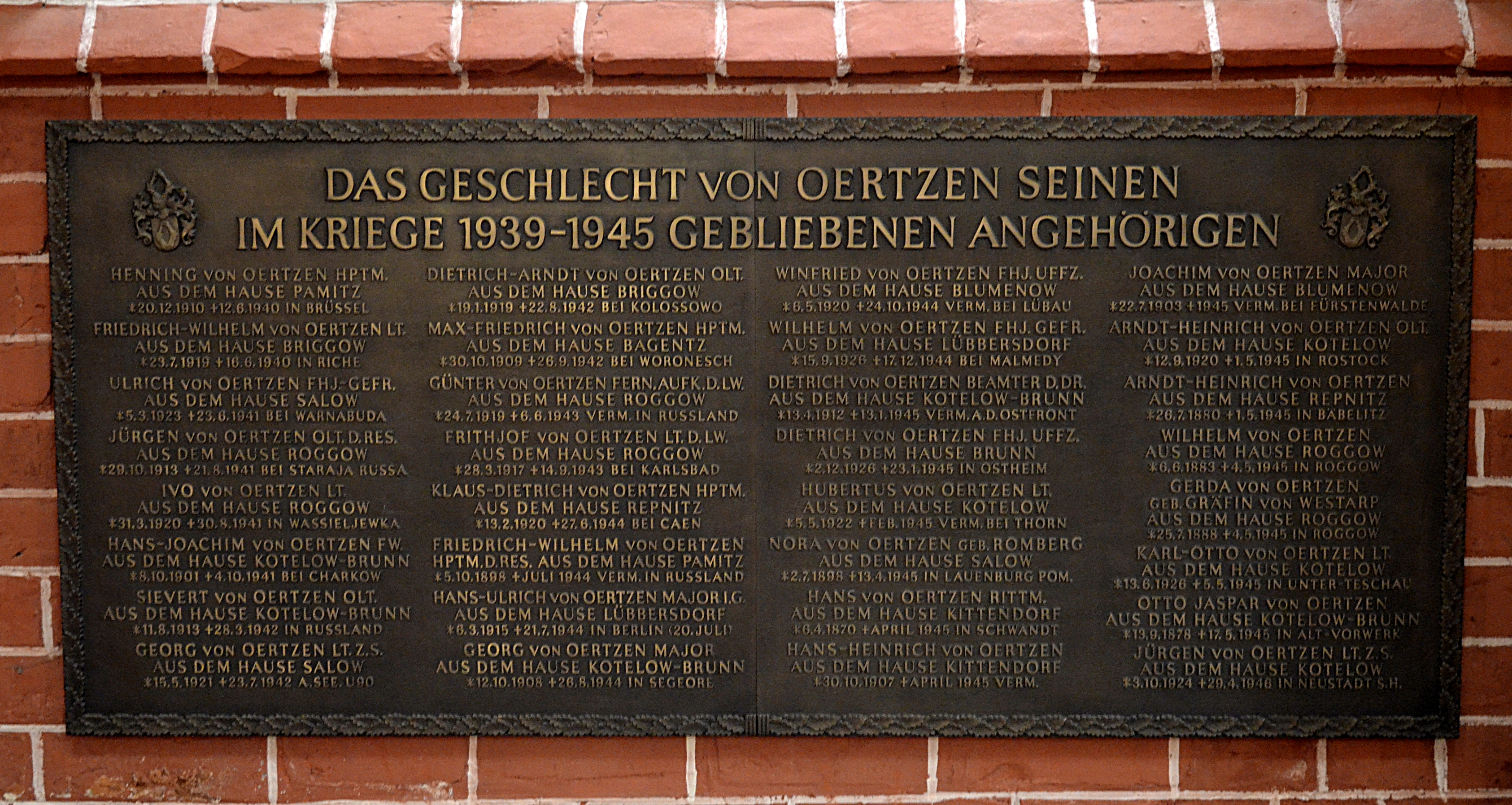 Bad Doberan, Münster, Gedenkplatte von Oertzen